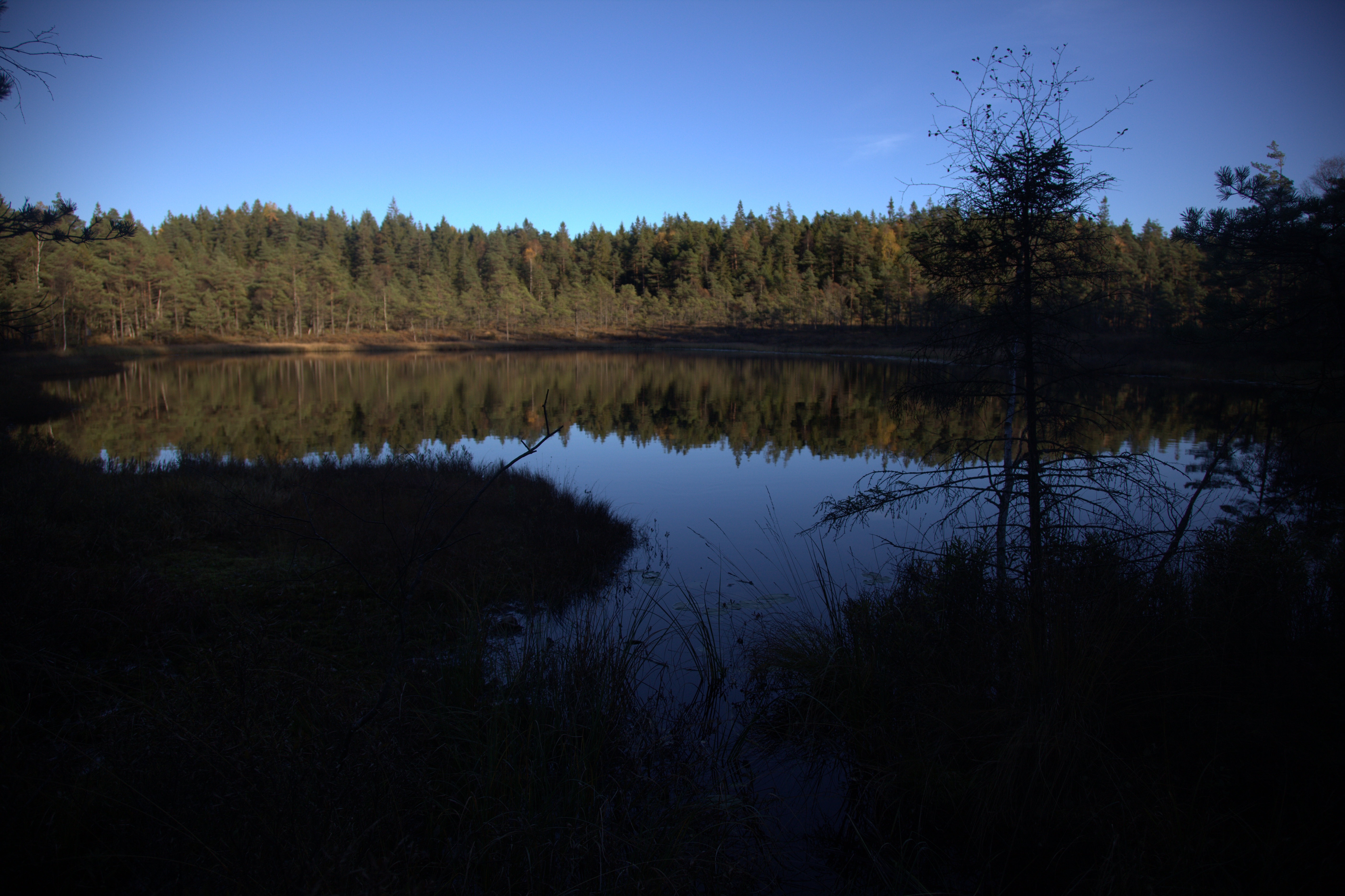 Lilla Nornäbban i Kungälvs kommun